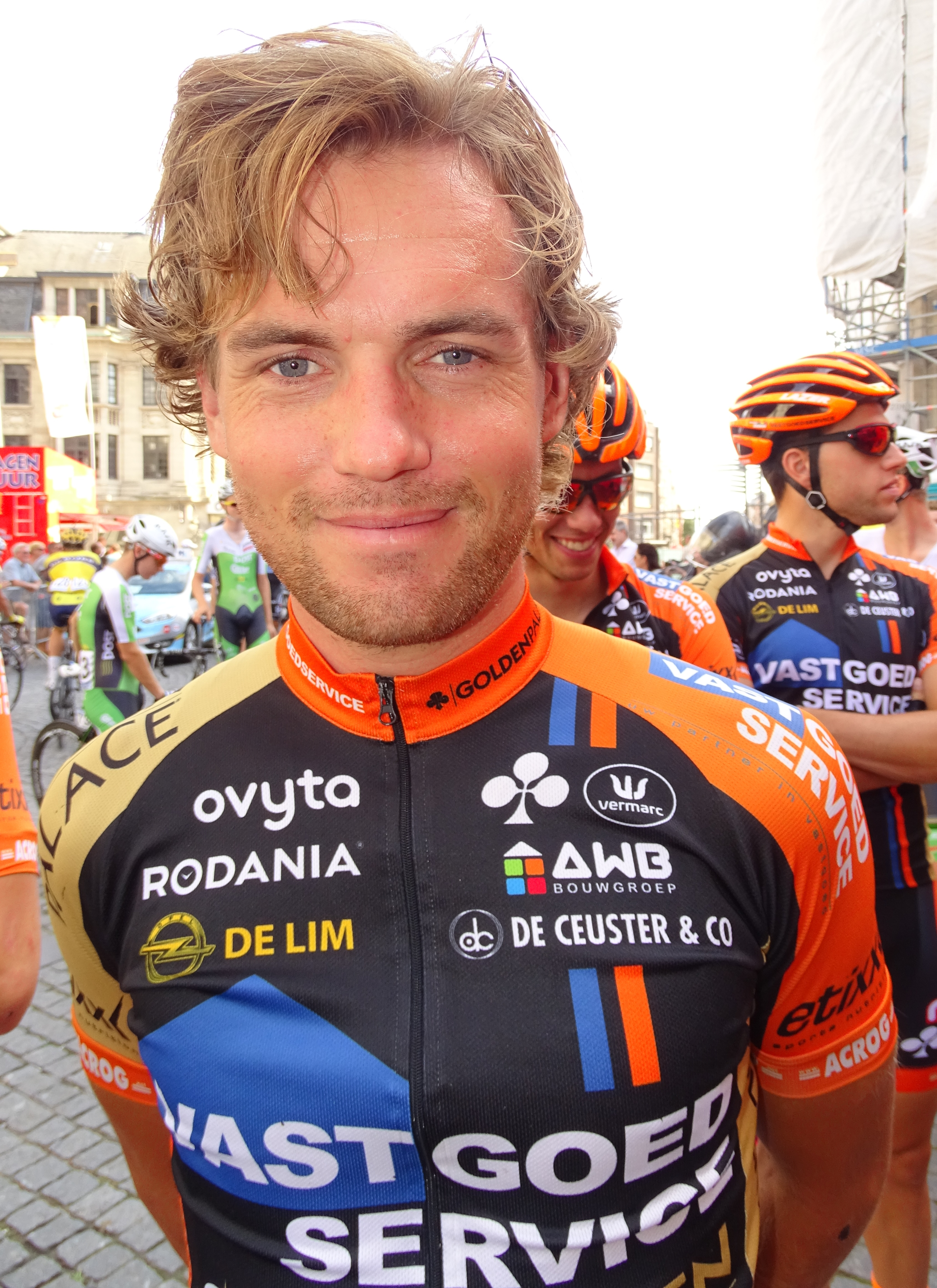 Reportage réalisé le dimanche 23 août à l'occasion du départ et de l'arrivée du Grand Prix Jef Scherens 2015 à Louvain, Belgique.